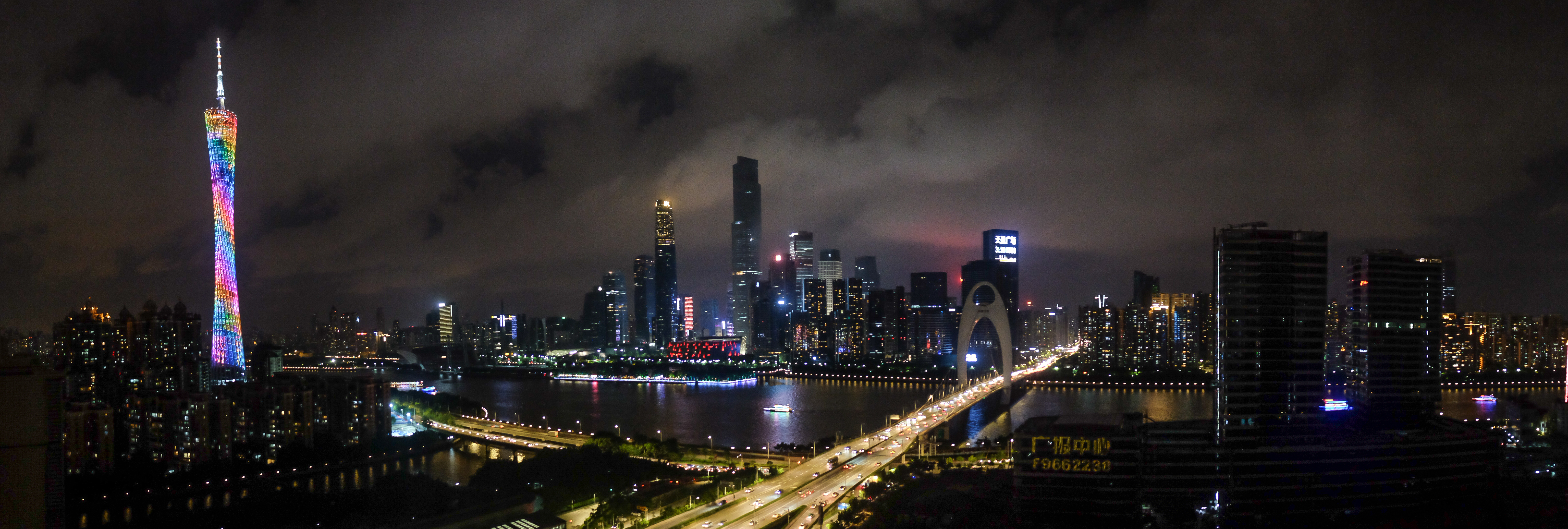 Vue sur le quartier Quartier de Tianhe à Canton (Chine) de nuit avec la Canton Tower, la tour IFC, la tour du CTF Finance Centre